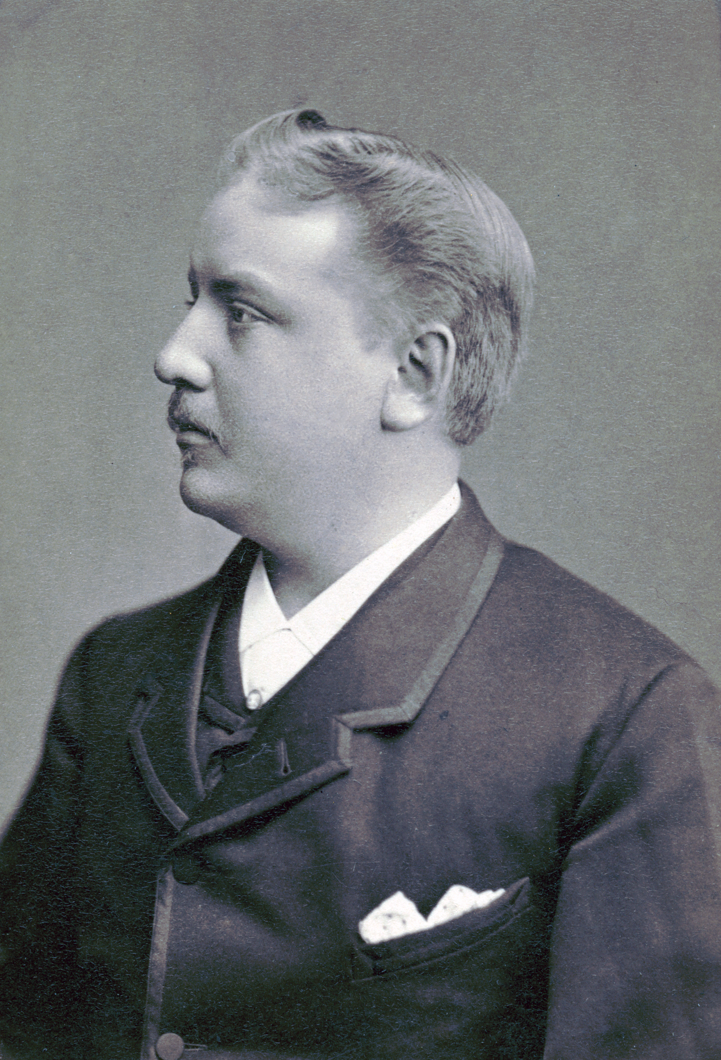 William Engelbrecht, skådespelare vid Nya teatern 1880